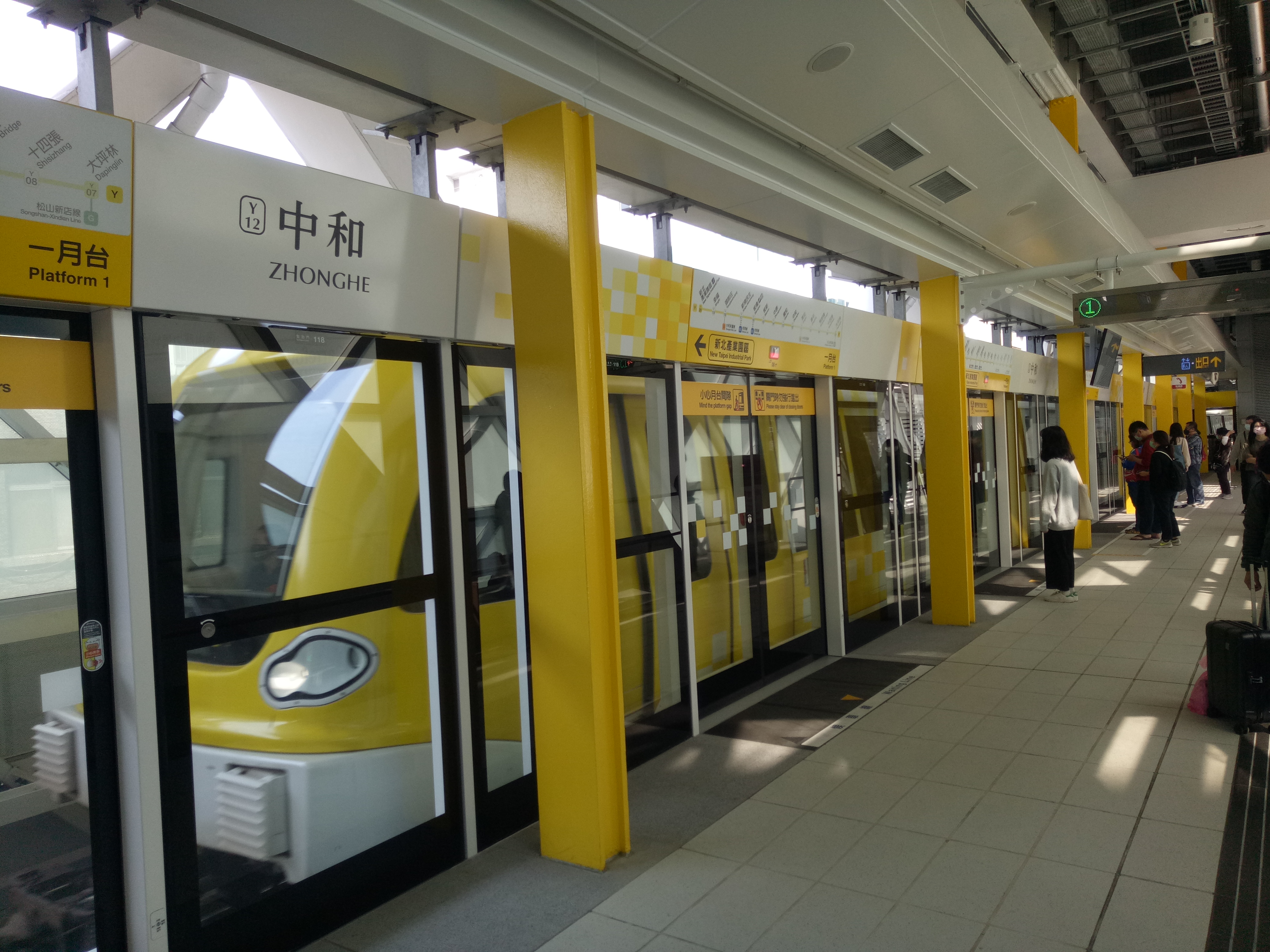 台北捷運中和站環狀線月台1 (新北產業園區方向)